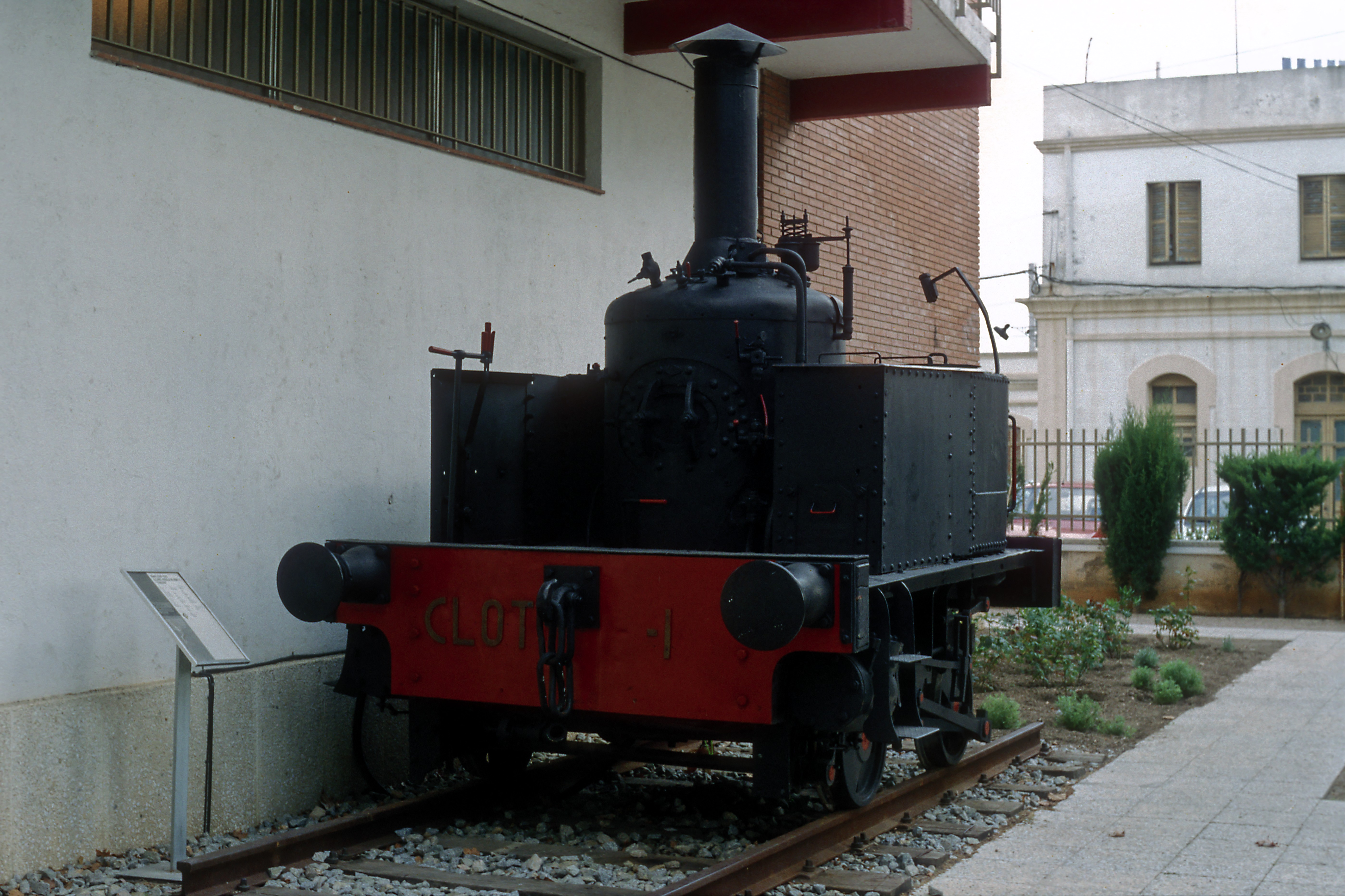 Bn2-Stehkessellok (später 020 0210 »Teresita«), vor dem Museumseingang